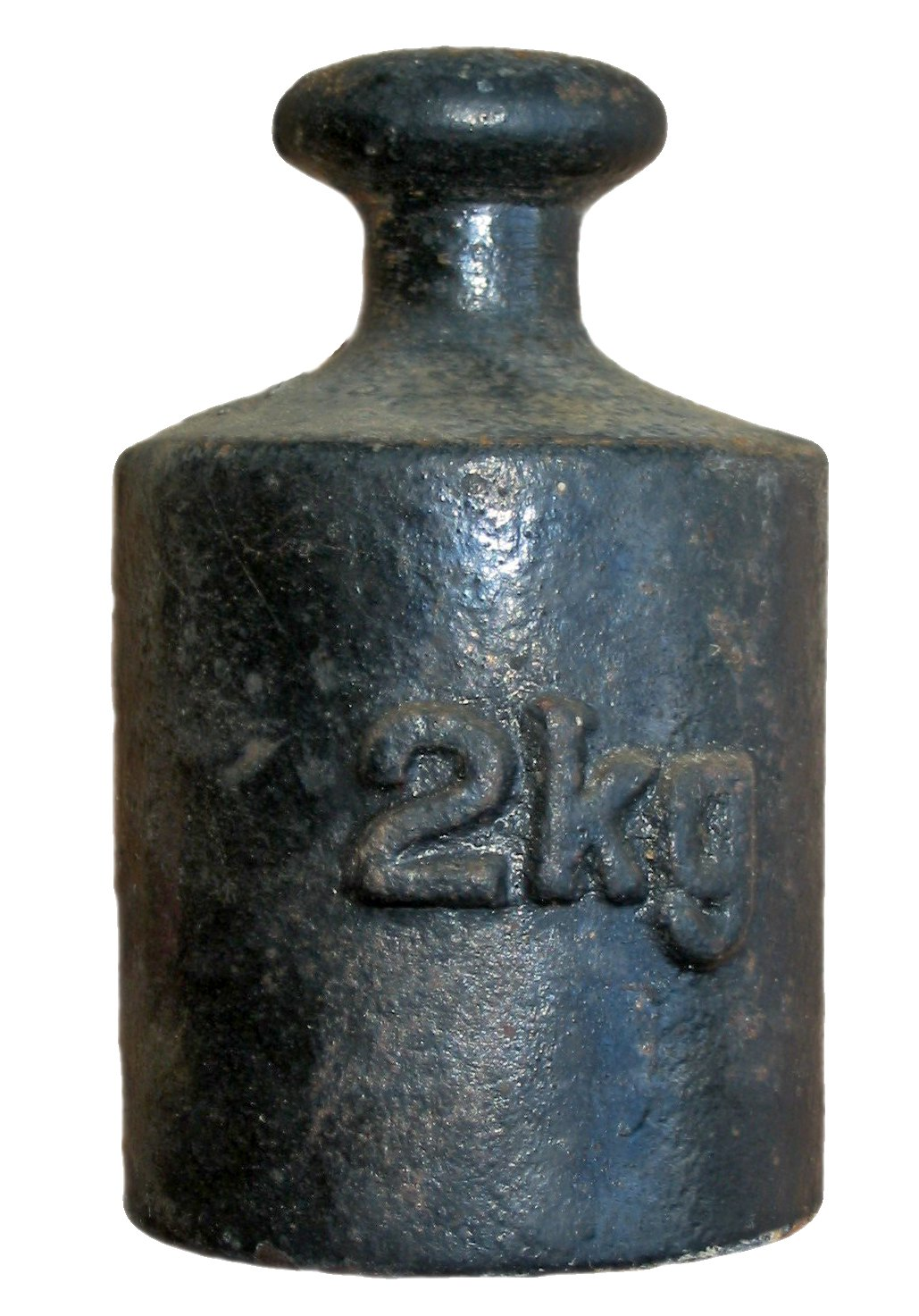 2kg Gewicht